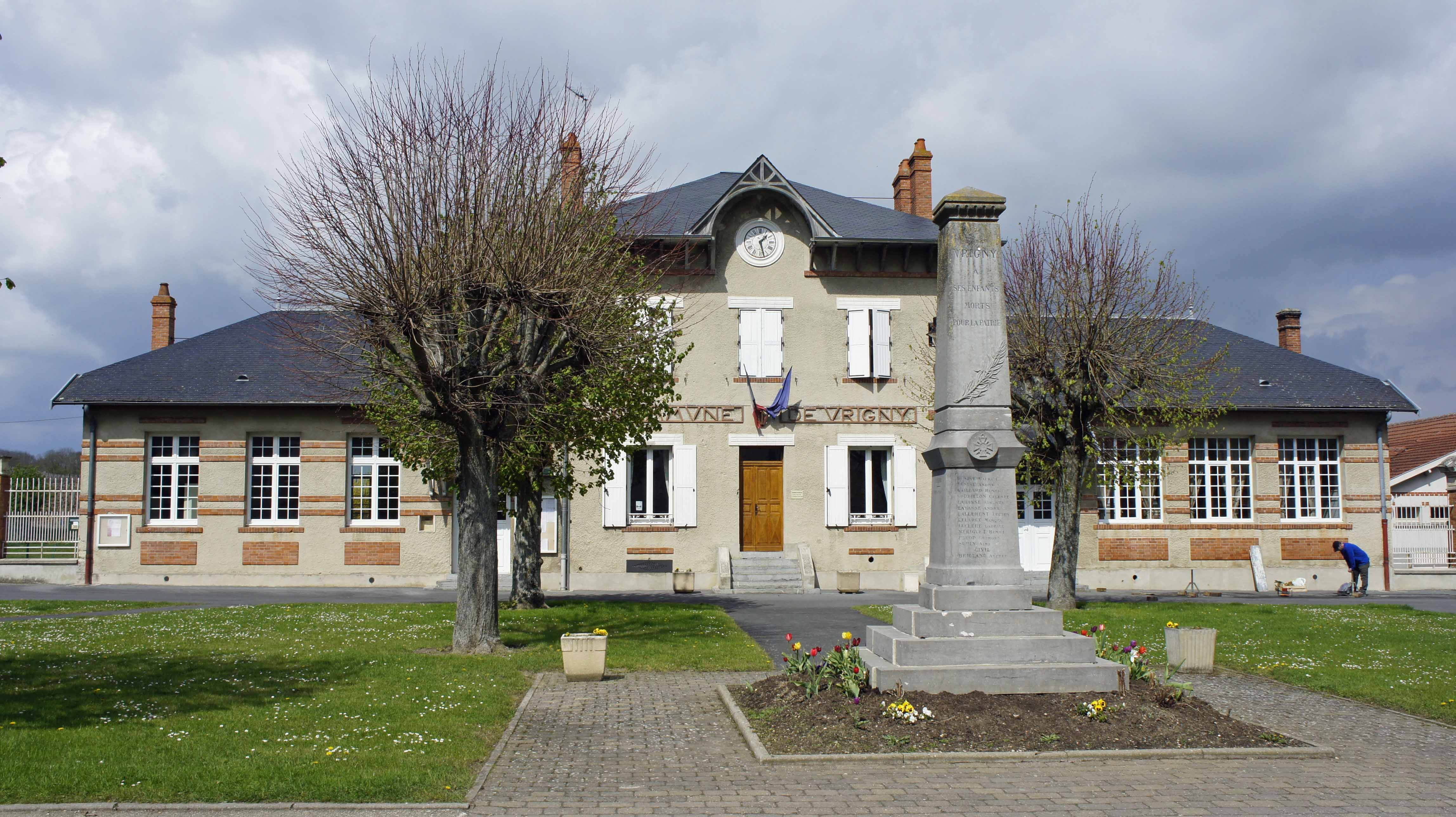 monument aux morts et mairie à Vrigny.